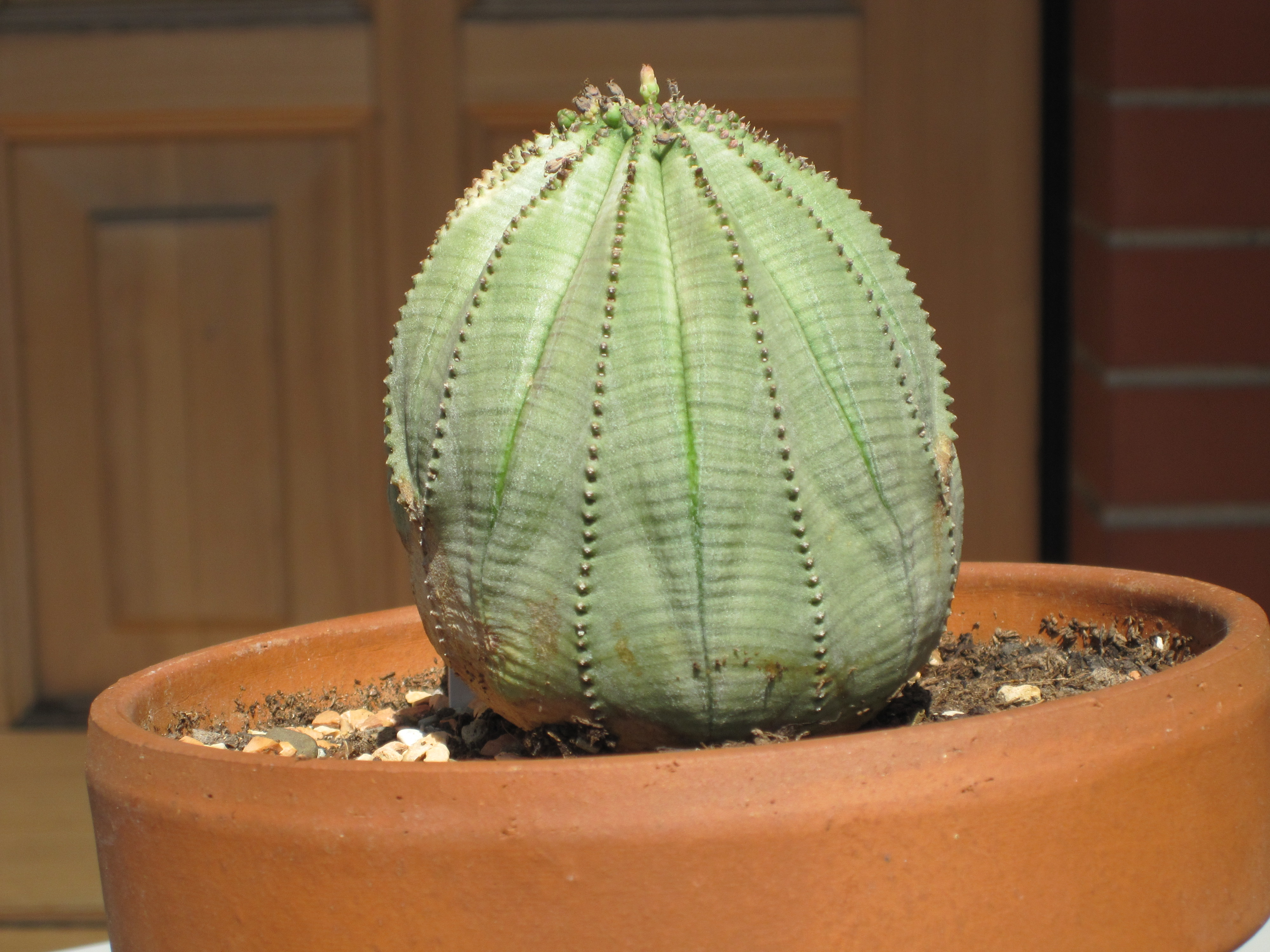 Euphorbia obesa